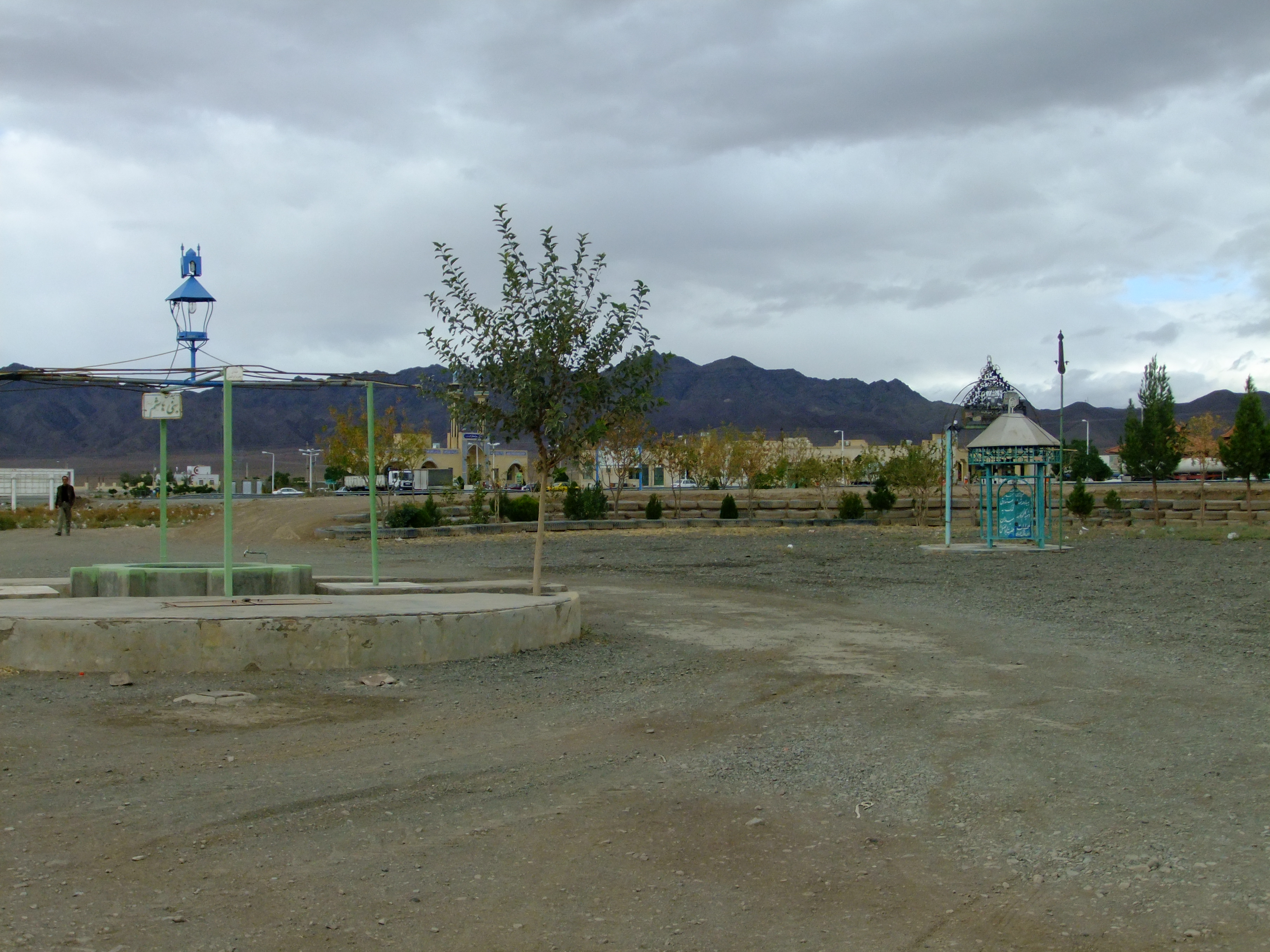 تصویر میدان اصلی روستای کاهک سبزوار